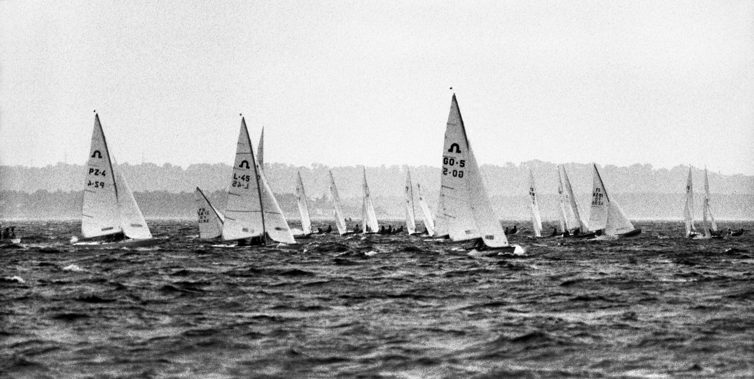 Balti regatt 79 (07)